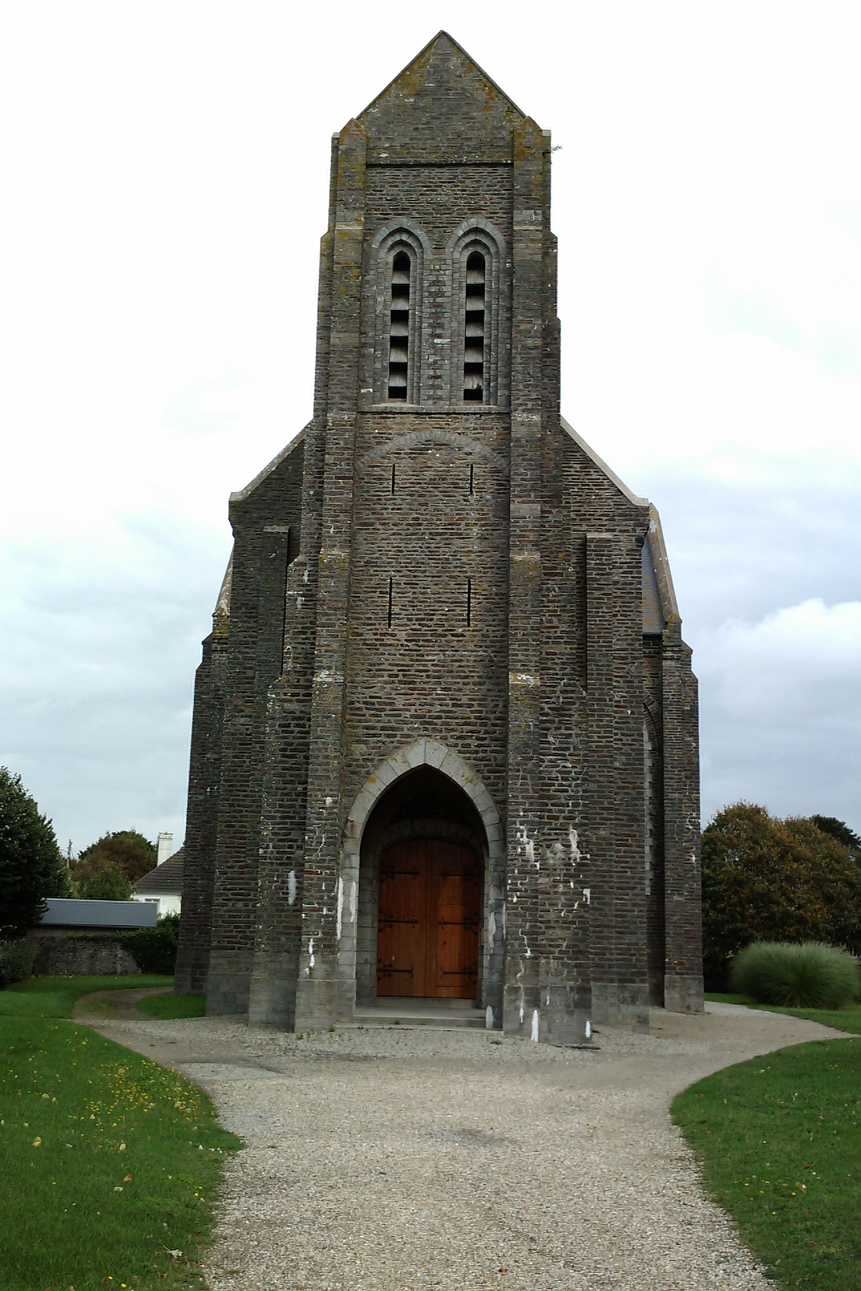 actuelle église paroissiale de Barneville-Carteret. Construite après la séparation de l'Eglise et de l'Etat, elle fut ouverte au culte le 6 septembre 1908.